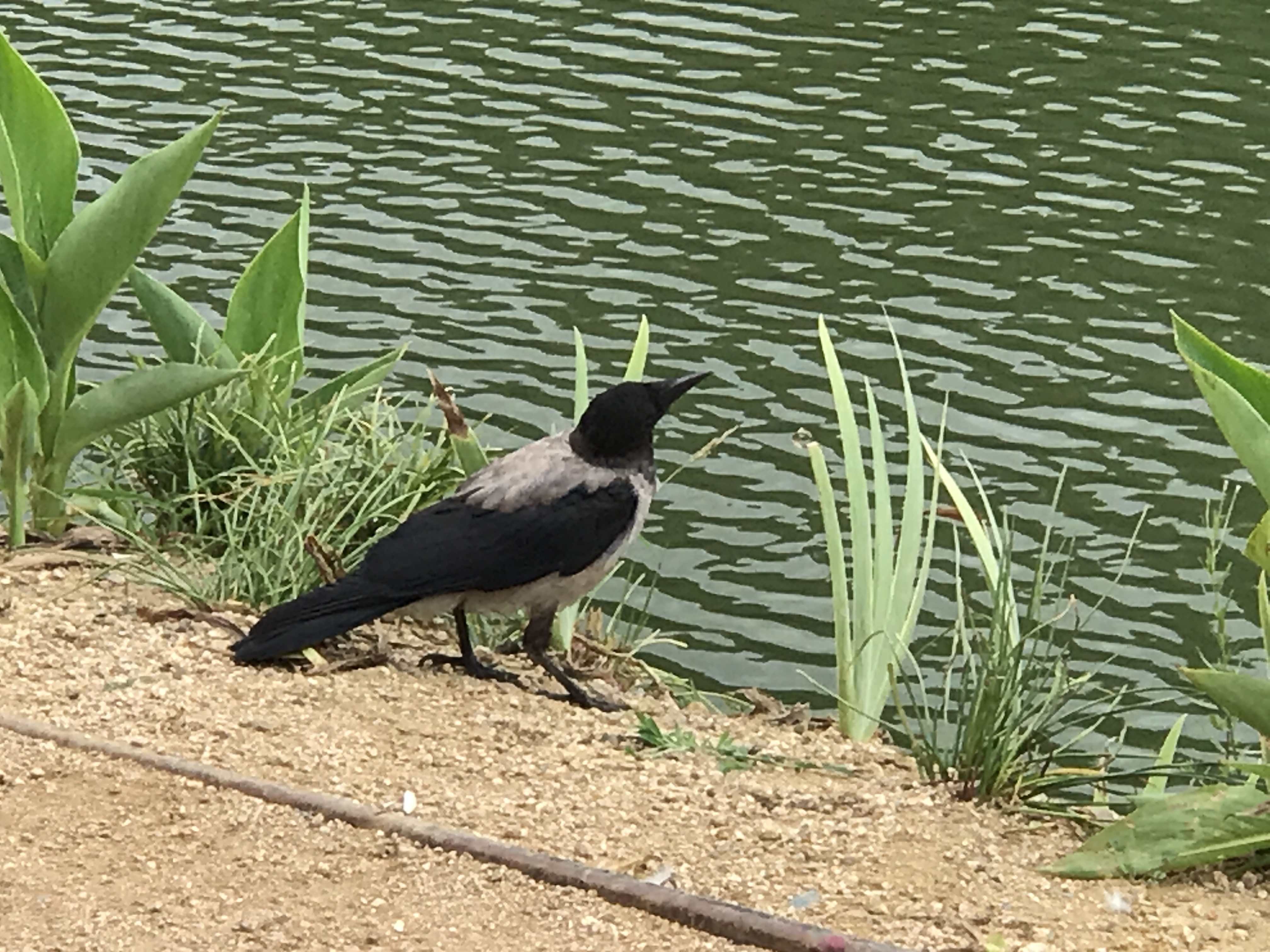 İstanbul Atatürk Kent Ormanı